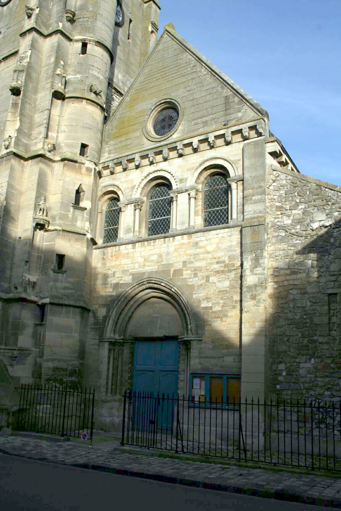 Façade de l'église de Maule - Yvelines (France)